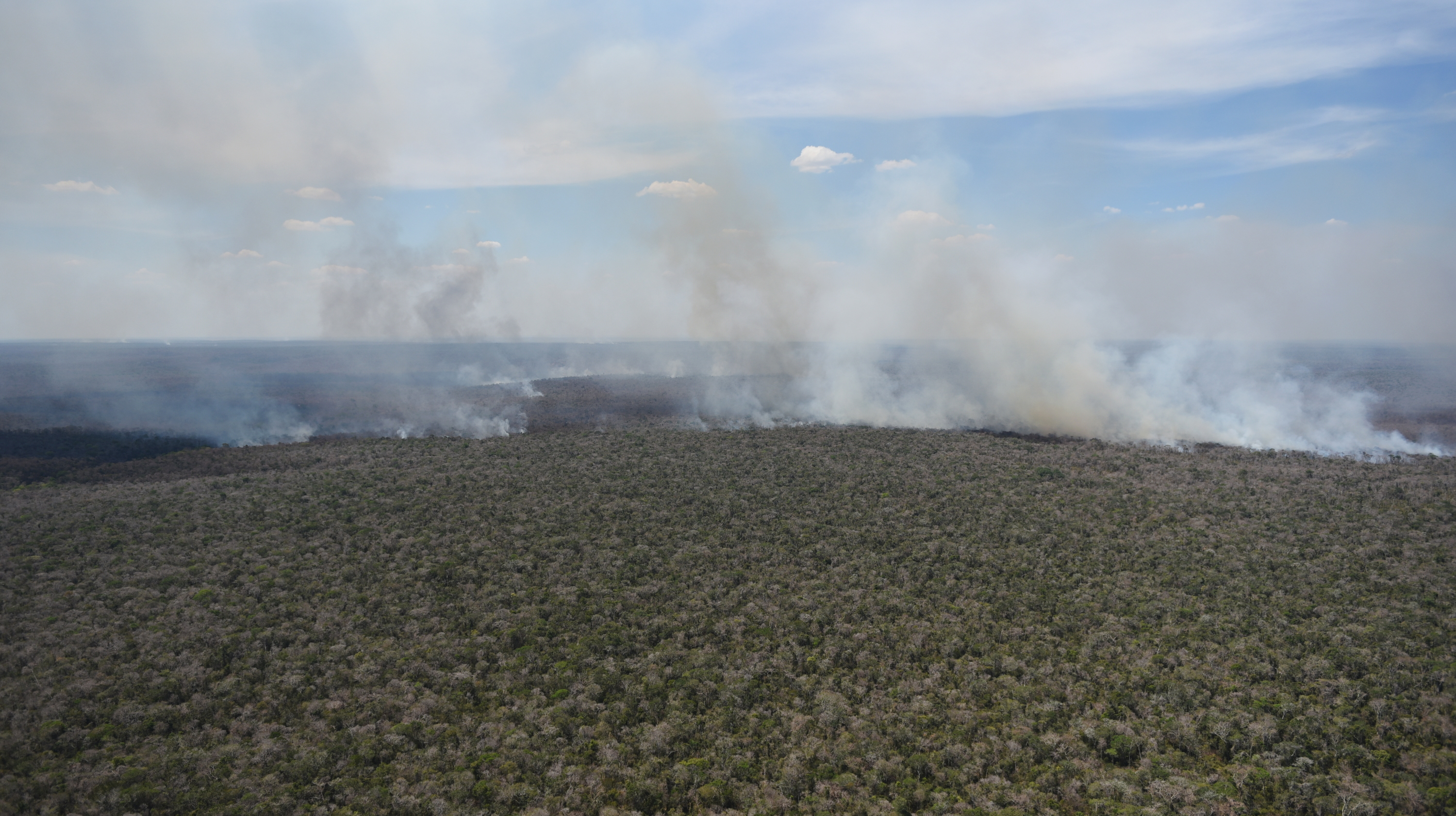 Brigadas indígenas do Prevfogo/Ibama combatem incêndio florestal na Terra Indígena Porquinhos, no Maranhão Foto: Felipe Werneck/Ibama